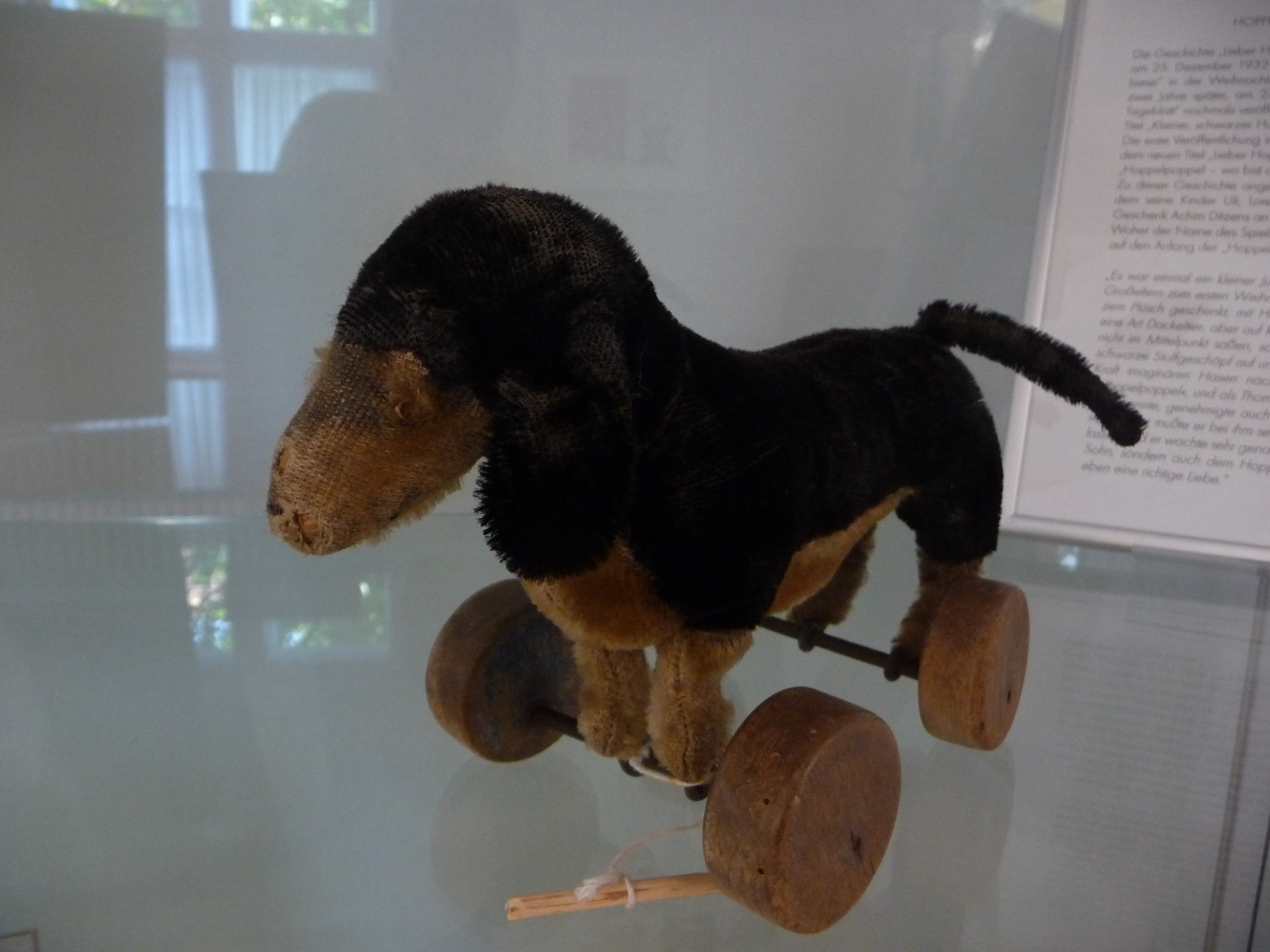 Der echte Hoppelpoppel